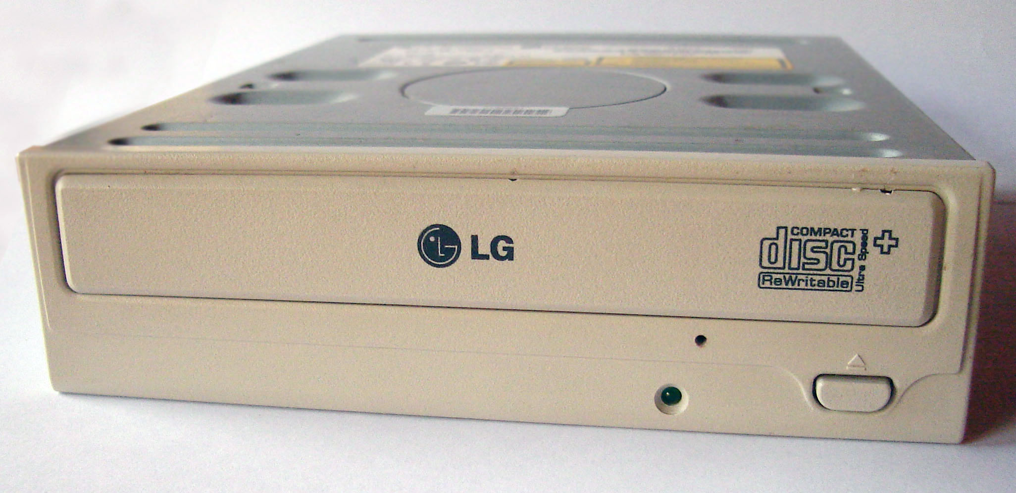 Leitor de CD.